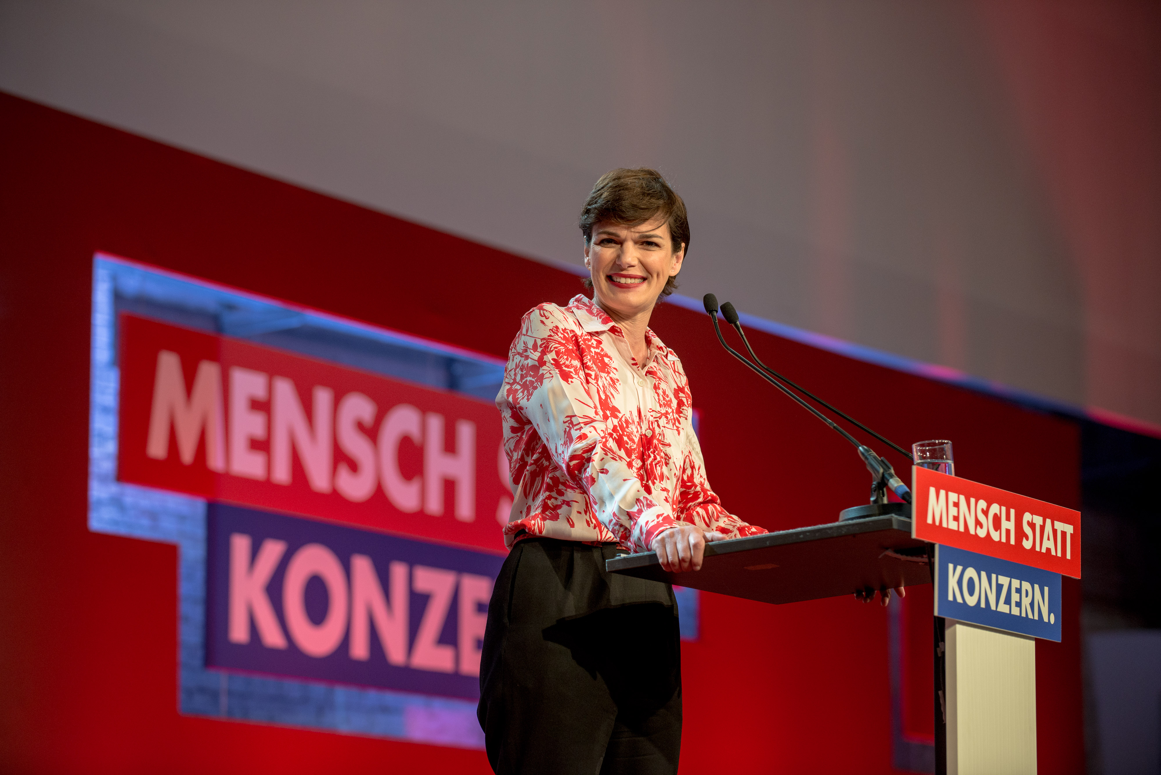 am 6. April startete die SPÖ in der Expedithalle in Wien in den Europawahlkampf. Mit dabei: SPÖ-EU-Spitzenkandidat Andreas Schieder, SPÖ-Parteivorsitzende Pamela Rendi-Wagner, der europaweite Spitzenkandidat der SozialdemokratInnen Frans Timmermans u.v.m.